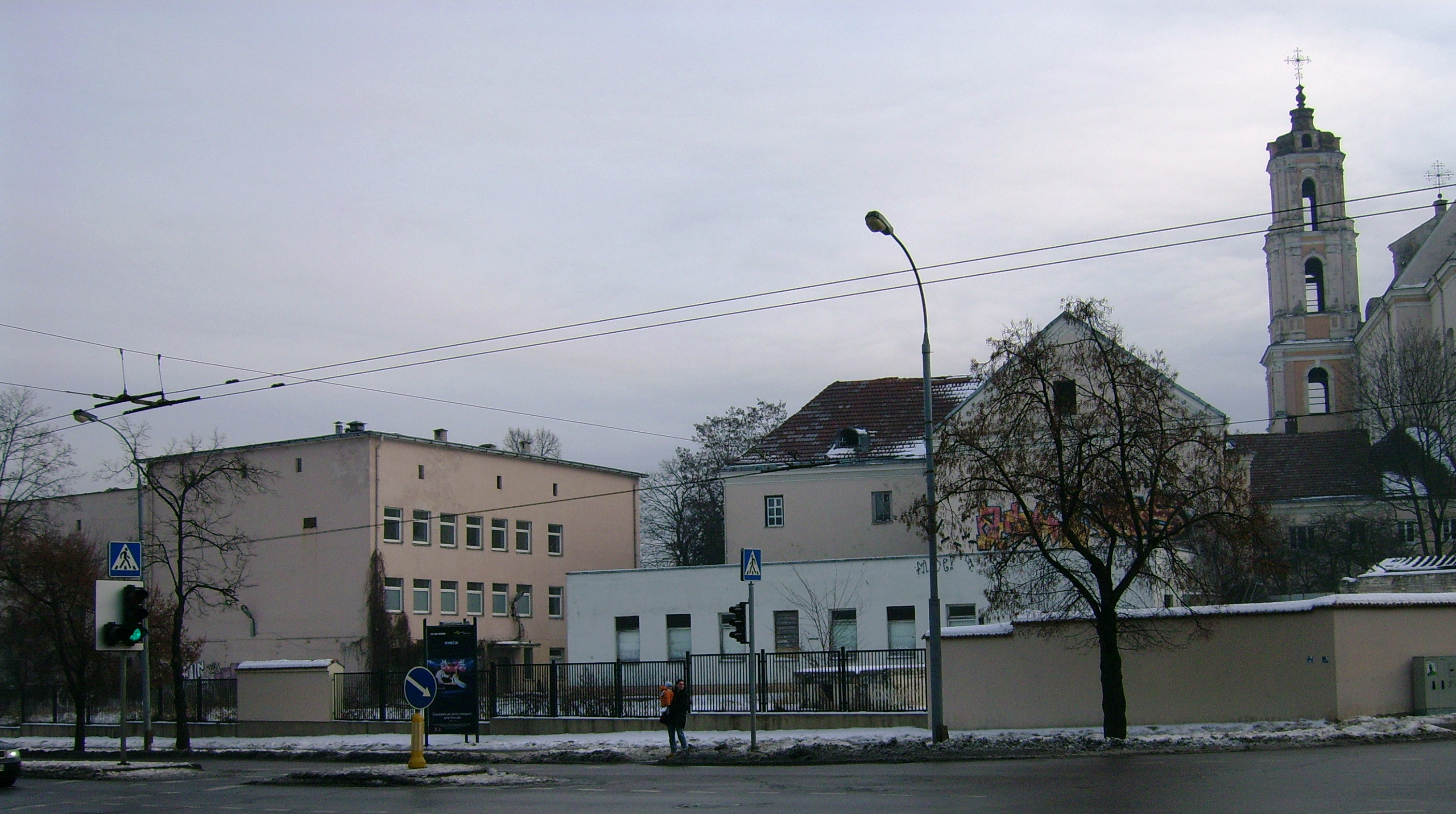 Šv, Jokūbo ligoninė, Vilnius, Lietuva